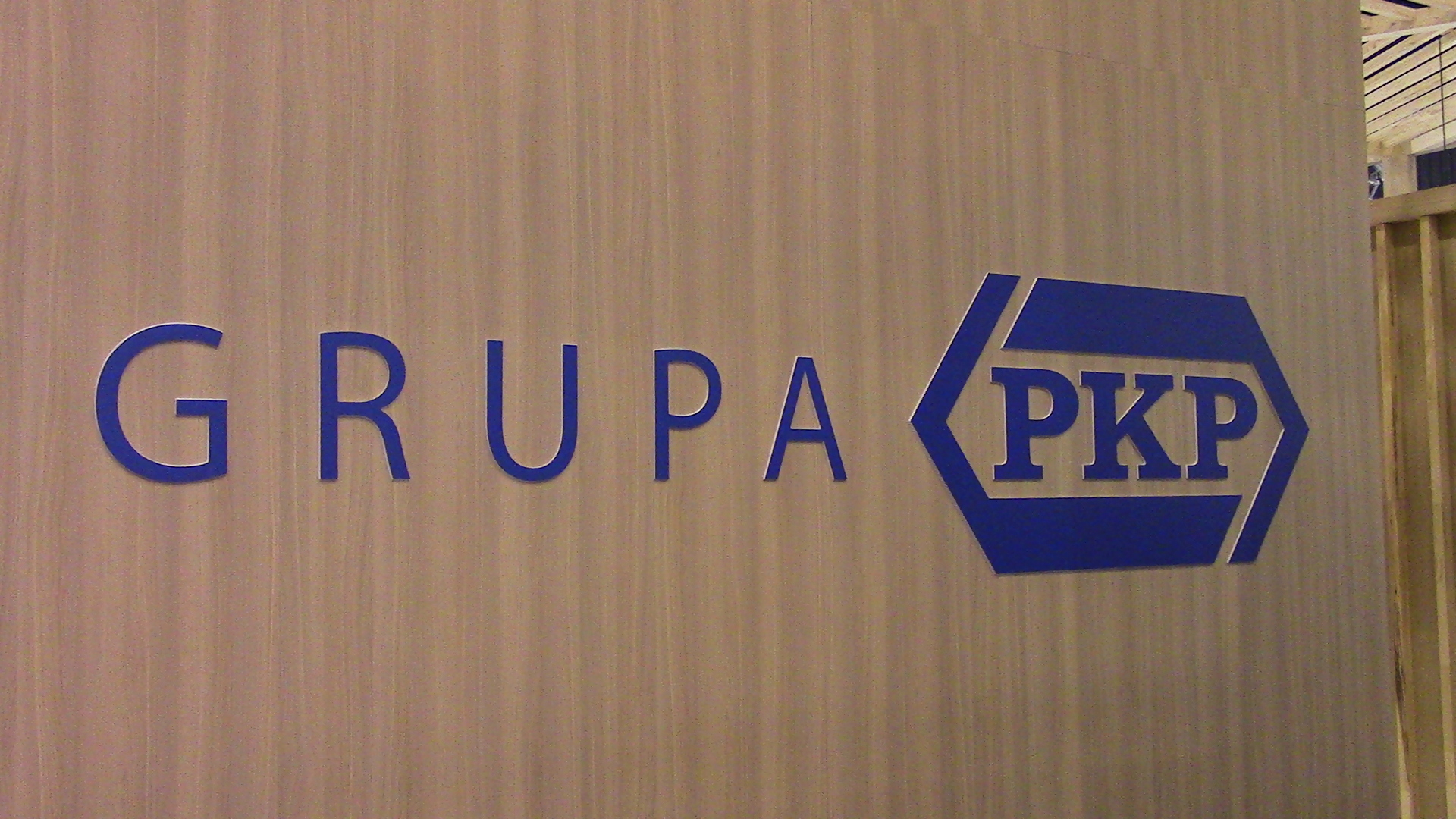 Grupa PKP